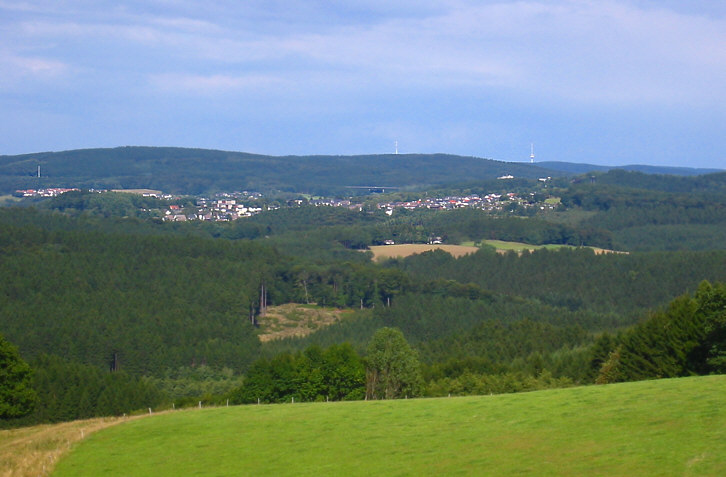 Meinerzhagen - Im Hintergrund die beiden Türme der Sender Nordhelle. - Darunter eine Brücke der Autobahn 45. - Meinerzhagen, Sommer 2004